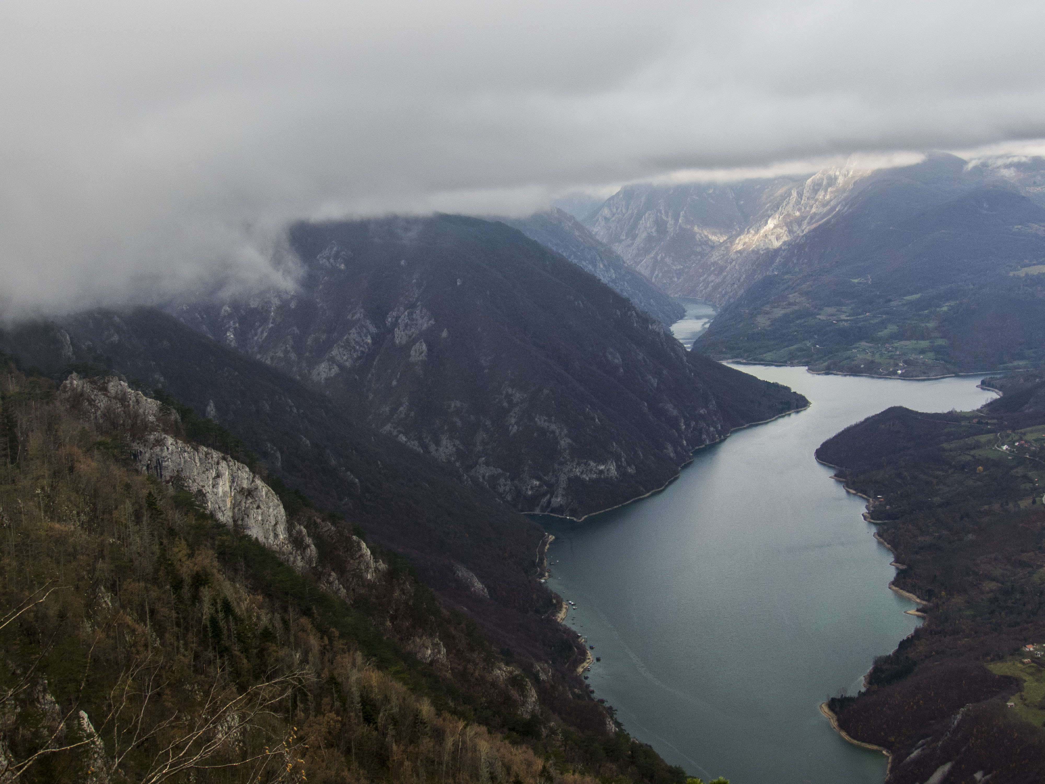 Српски (ћирилица): Видиковца Бањска стена , национални парк Тара Ово је фотографија заштићеног природног добра у Србији под шифром: НП03This is a a photo of a natural area in Serbia with ID: НП03